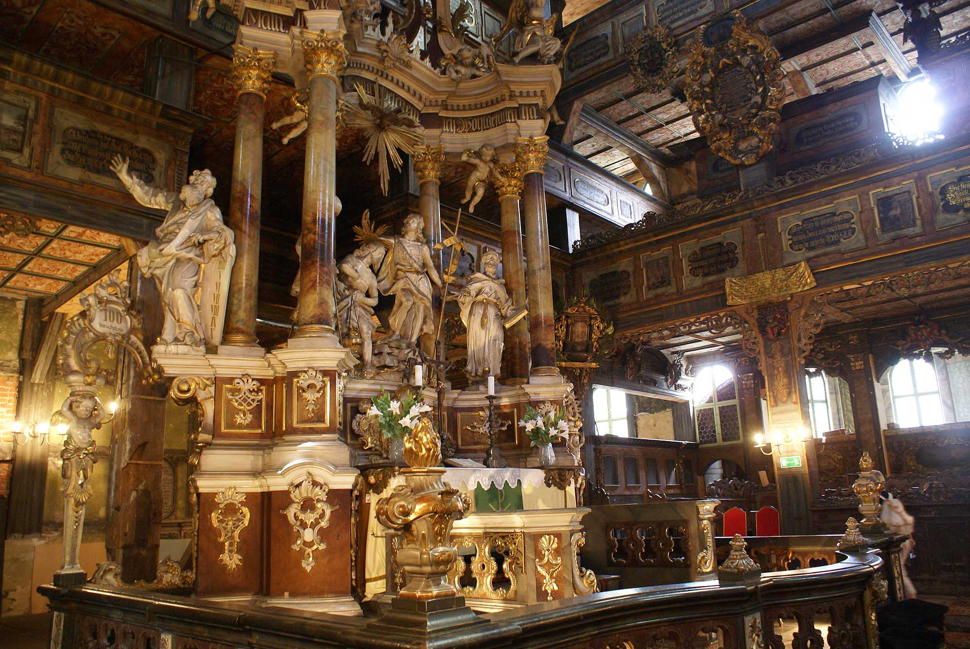 Świdnica, kościół ewangelicki (Pokoju), poł. XVII, XVIII